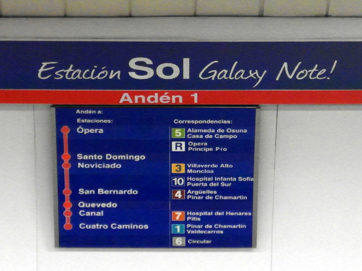 La estación Sol fue renombrada como Estación Sol Galaxy Note durante un mes por un acuerdo que firmó Metro de Madrid con Samsung para promocionar su dispositivo Galaxy Note en esa estación.